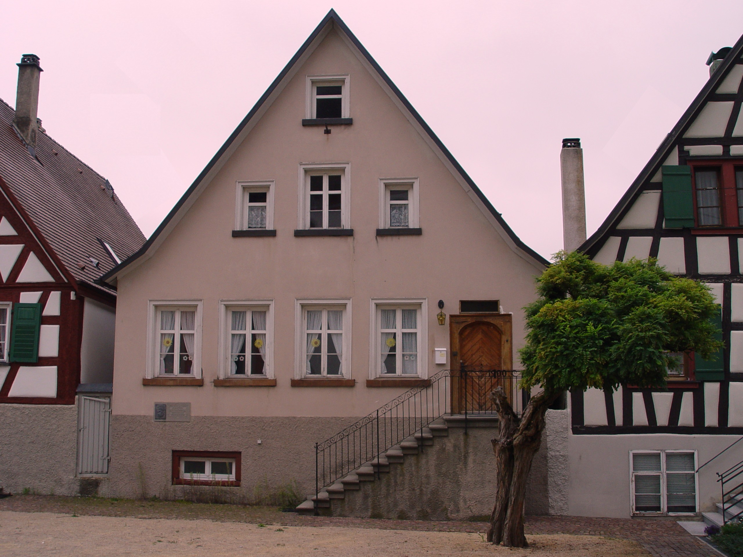 Geburtshaus von Martin Heidegger in Meßkirch, Baden-Württemberg (where Heidegger grew up)- (la maison natale d'Heidegger) - (ハイデッガーの出生地)